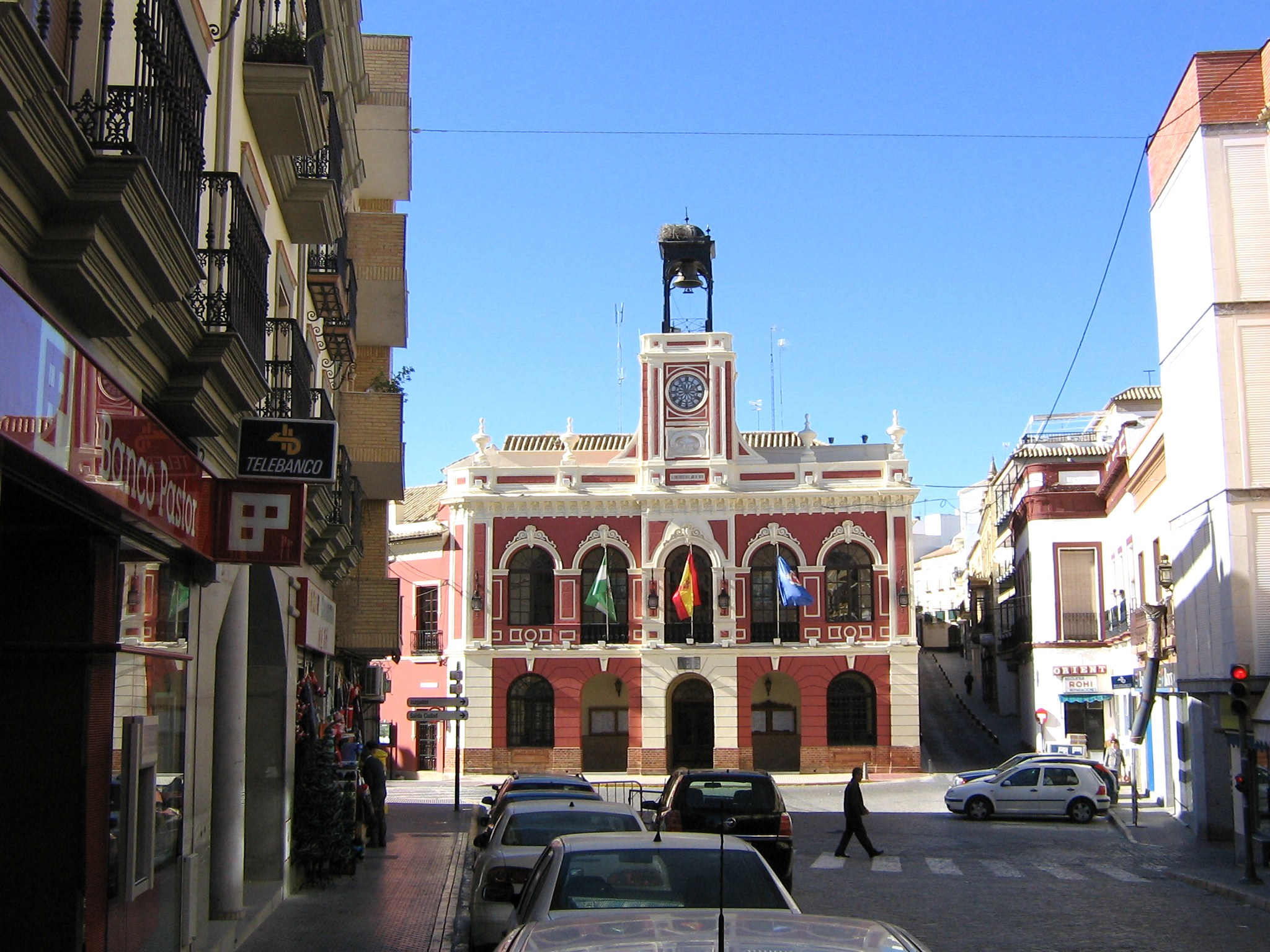 Fachada del Ayuntamiento de Morón de la Frontera (Sevilla)